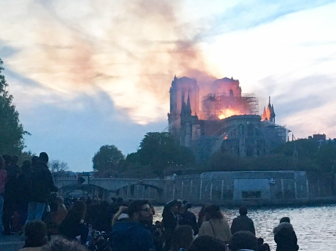 Incendie Notre Dame 21h00